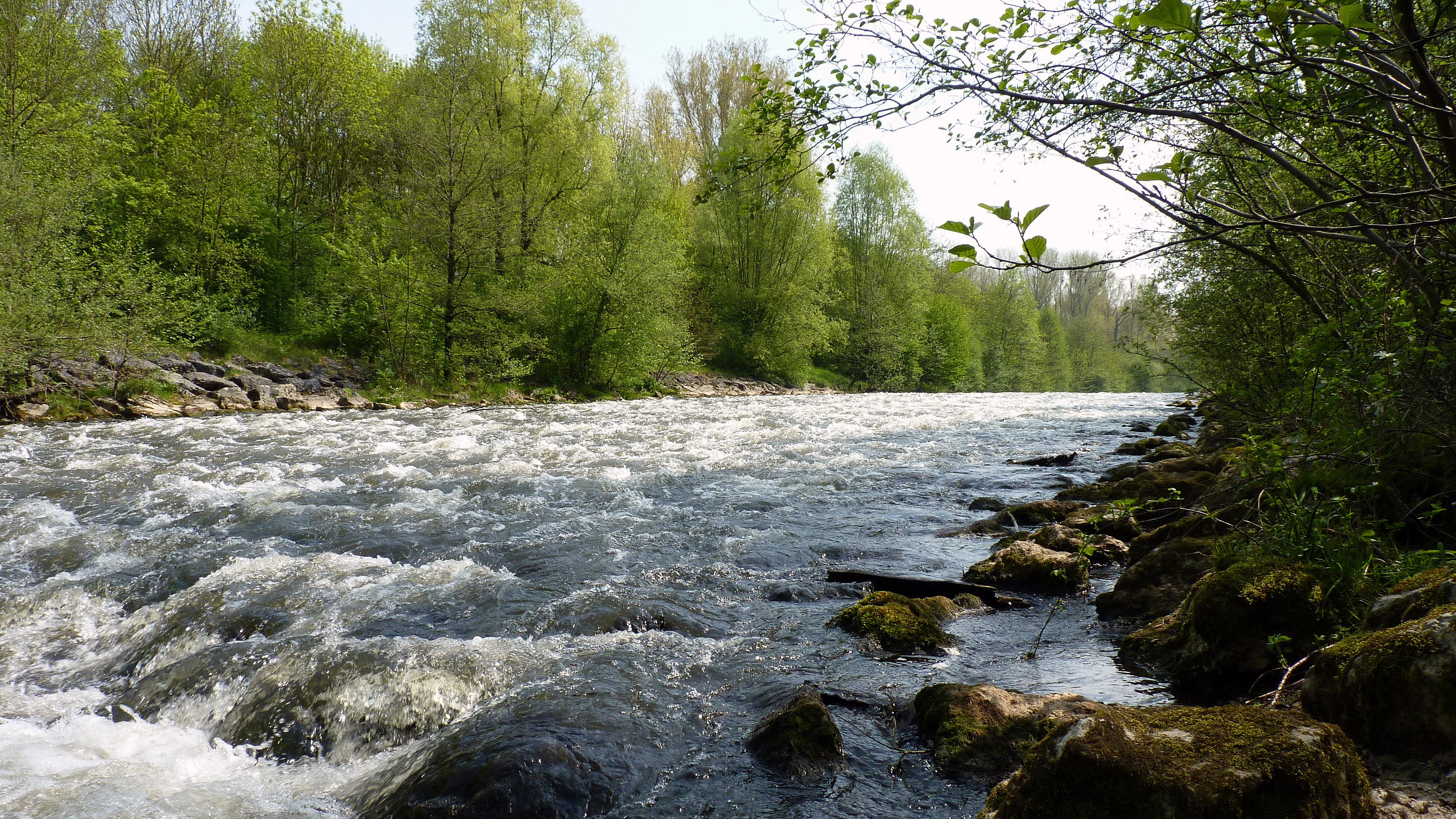 FFH-Gebiet Kellenberg und Rur zwischen Flossdorf und Broich WDPA ID 555520333 NSG Rurmaeander zwischen Flossdorf und Broich WDPA ID 165262 Rurkaskade DE -NW 1